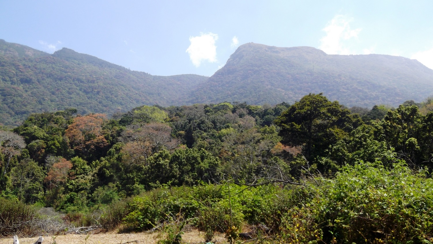 Pambadum Shola National Park